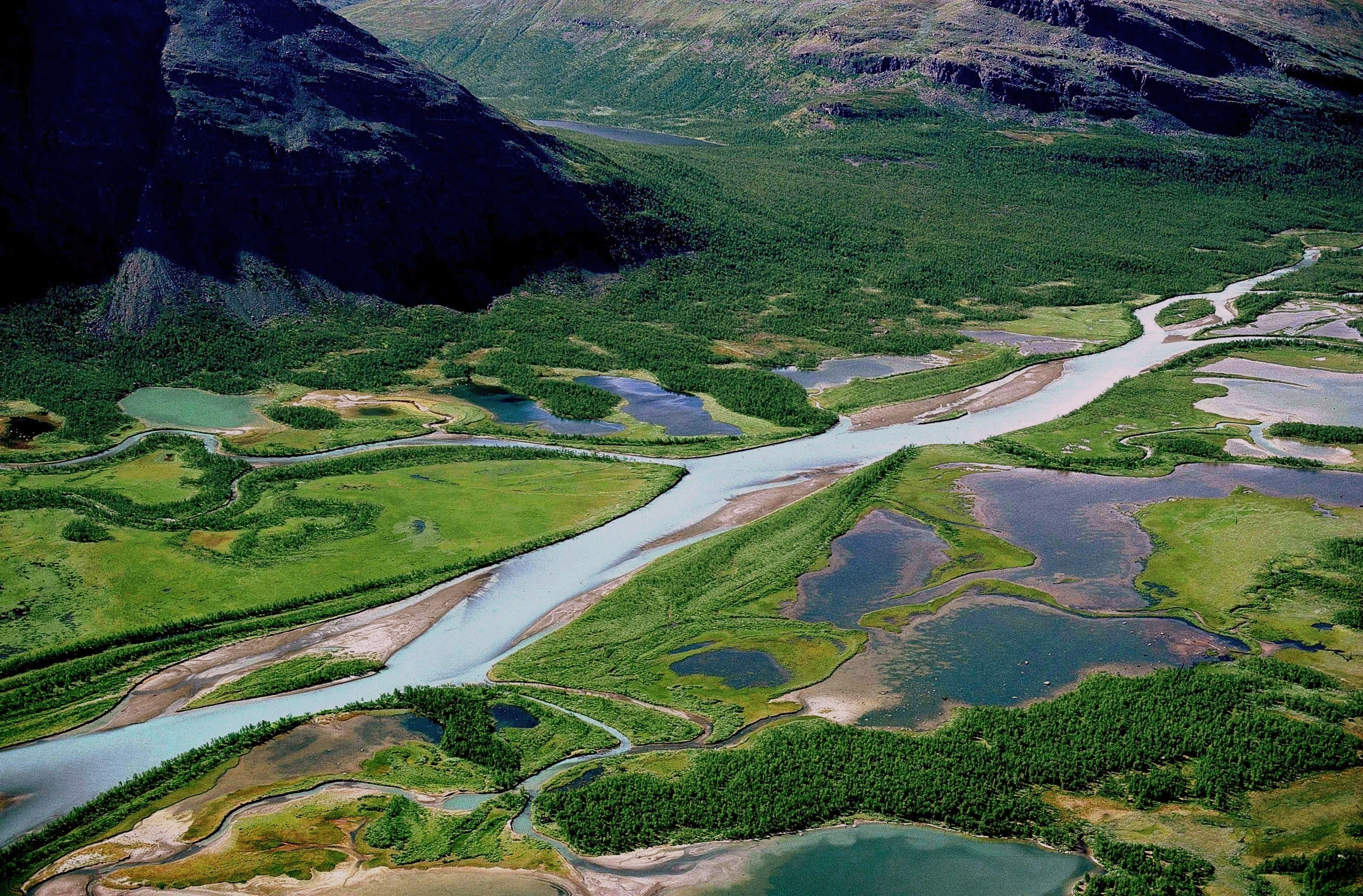 Rapaätno i Sarek